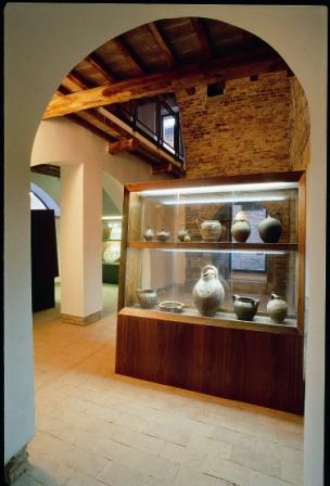 sala delle terrecotte nel Museo regionale della ceramica di Deruta